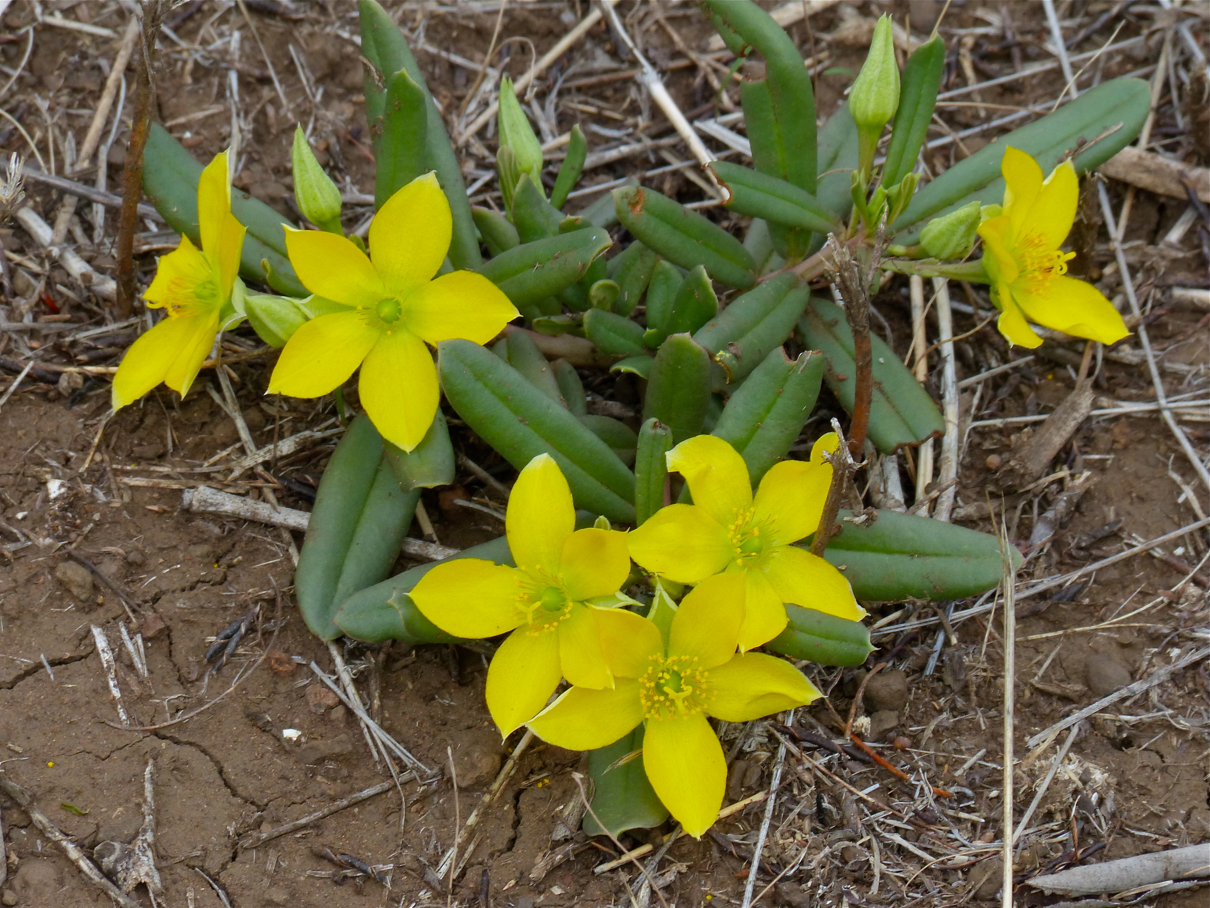 Mopani Camp, Kruger NP, SOUTH AFRICA